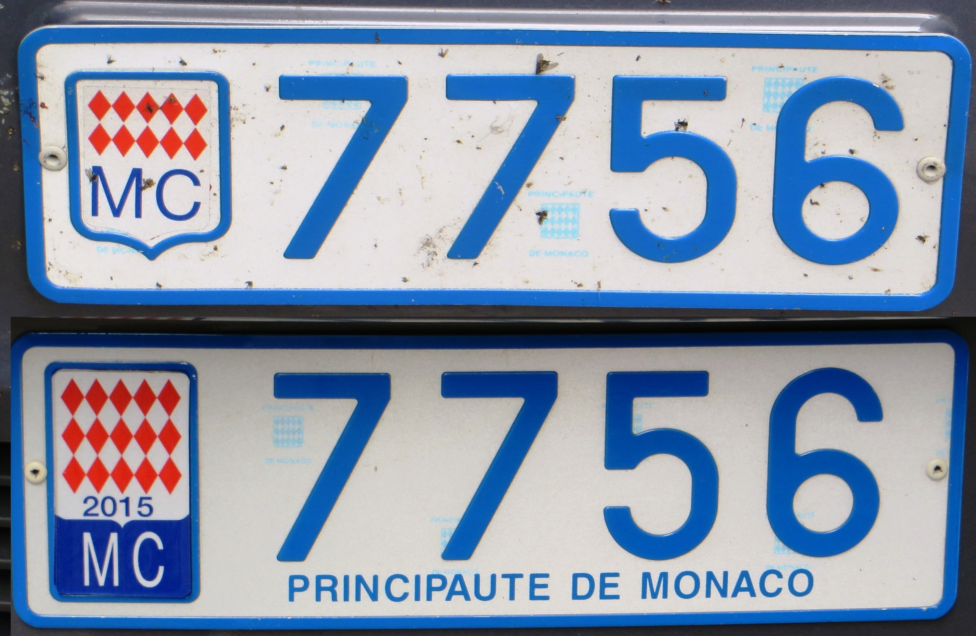 2015 Monaco kentekenplaat voor en achter